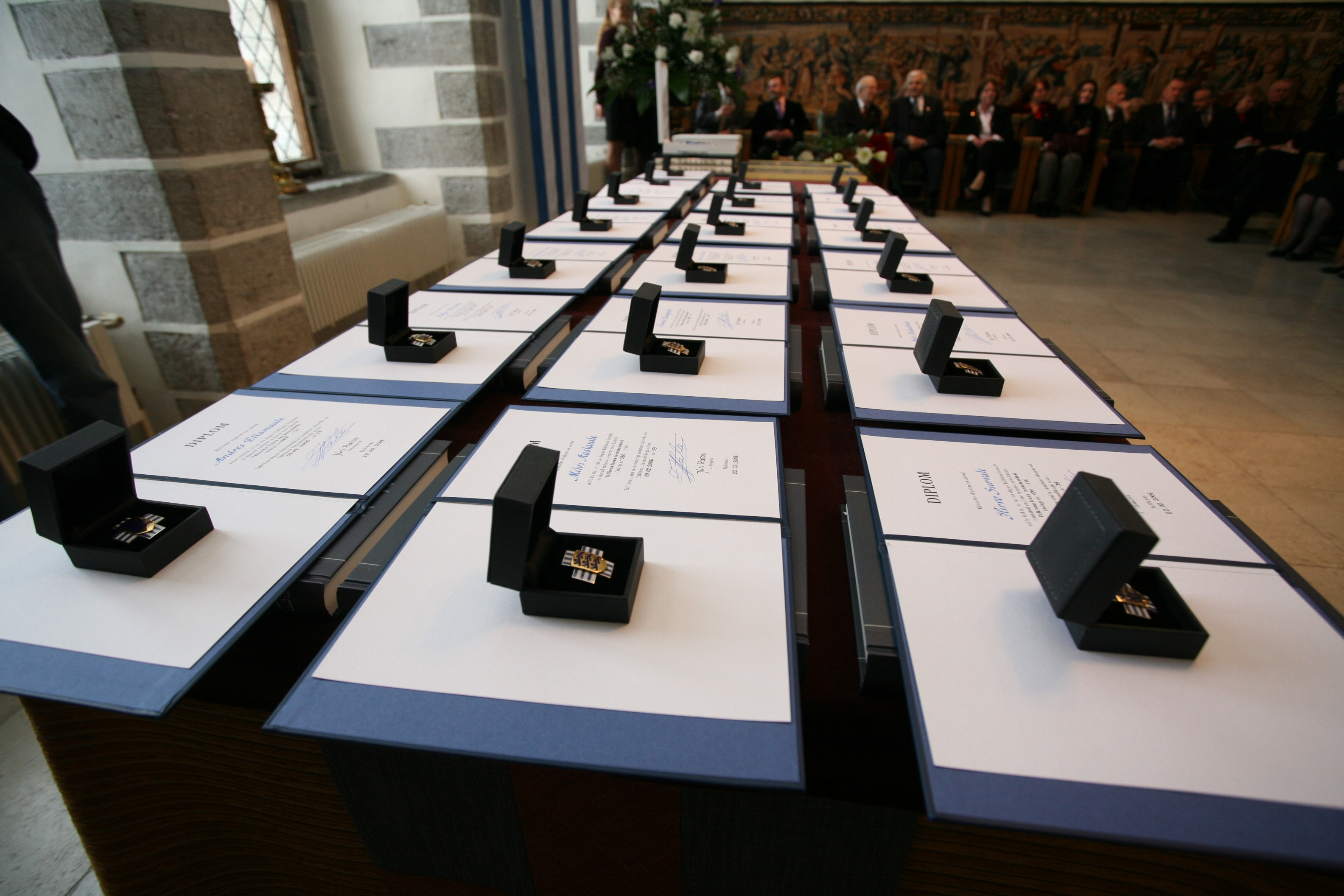 Tallinna teenetemärgid